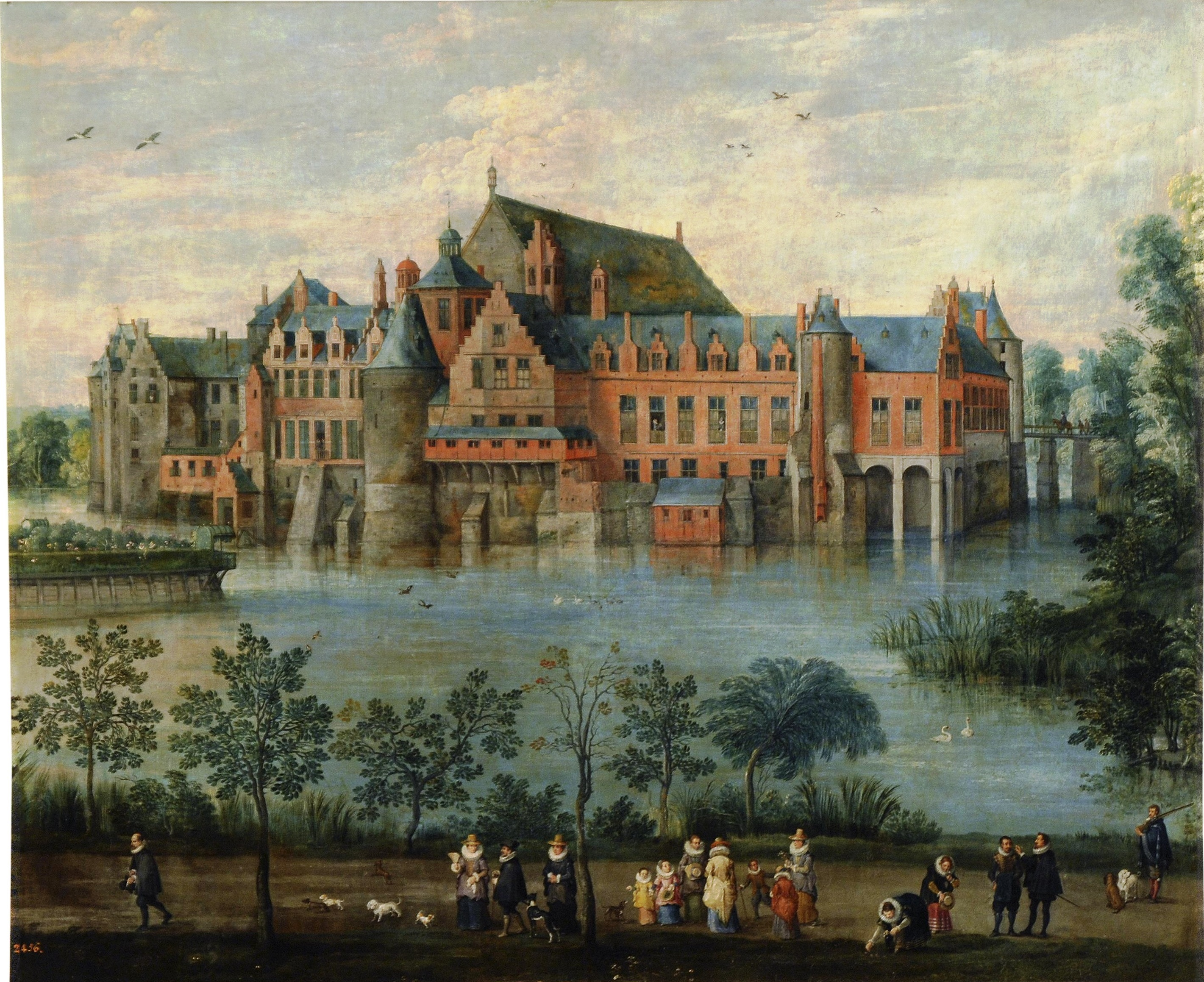 La obra muestra a los archiduques Alberto de Austria e Isabel Clara Eugenia, que fue infanta de España e hija del rey Felipe II de España, en el desaparecido castillo de Tervuren.